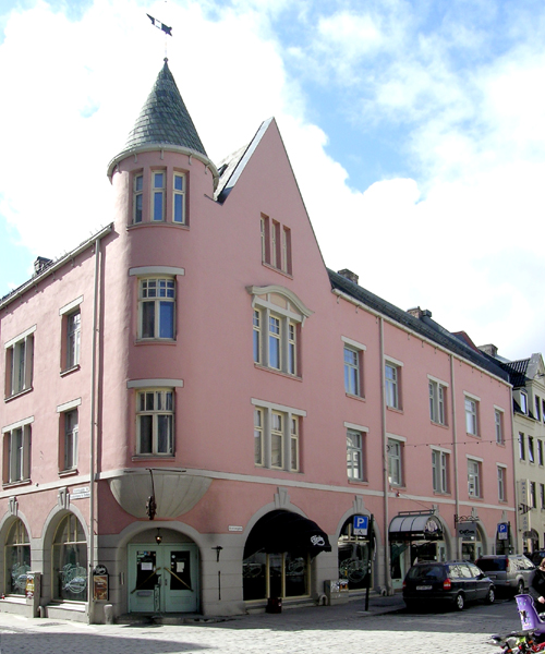 Krambugata 14, Trondheim. Bygd 1908. Arkitekt: Hagbarth Schytte-Berg.